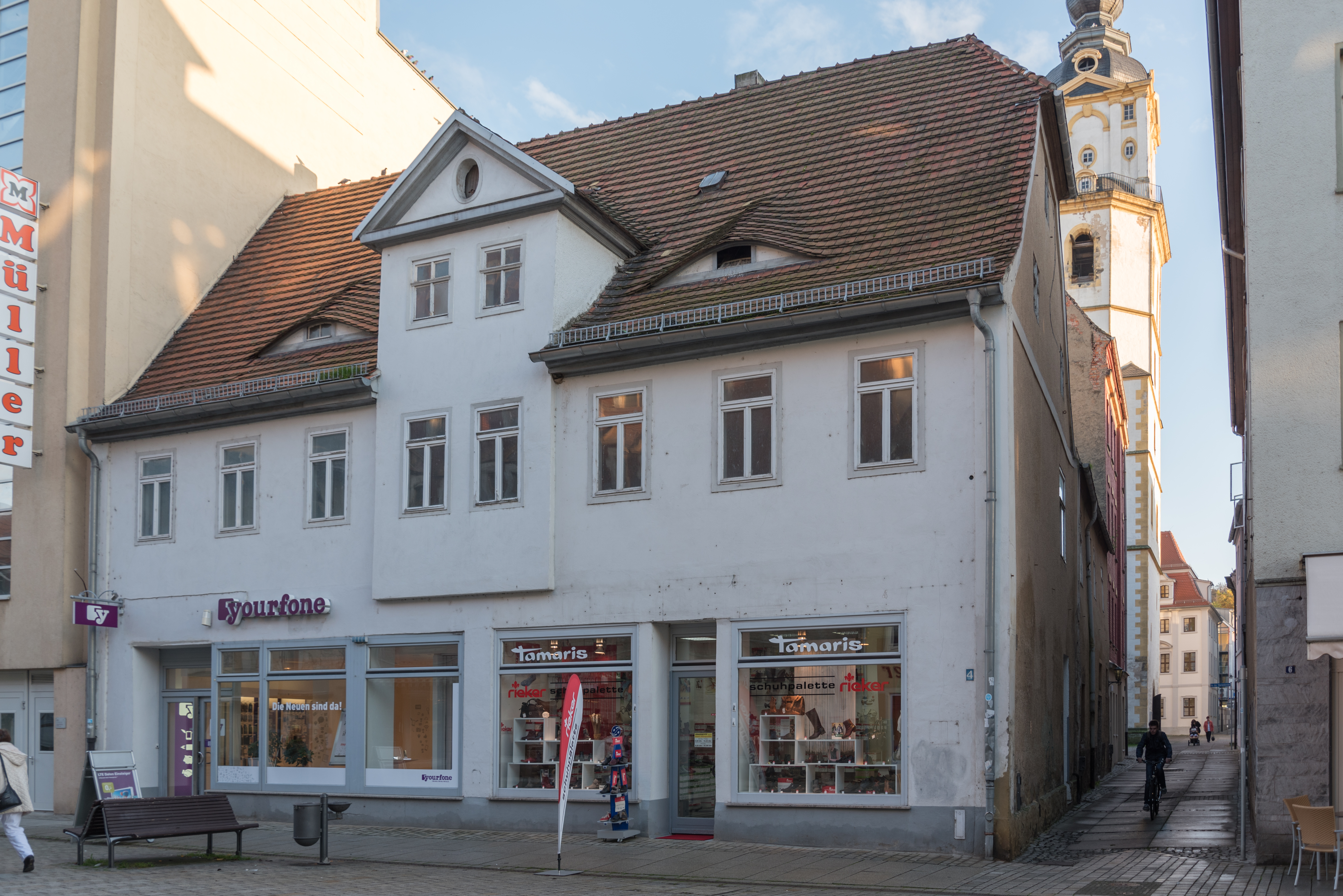 Weißenfels, Jüdenstraße 4